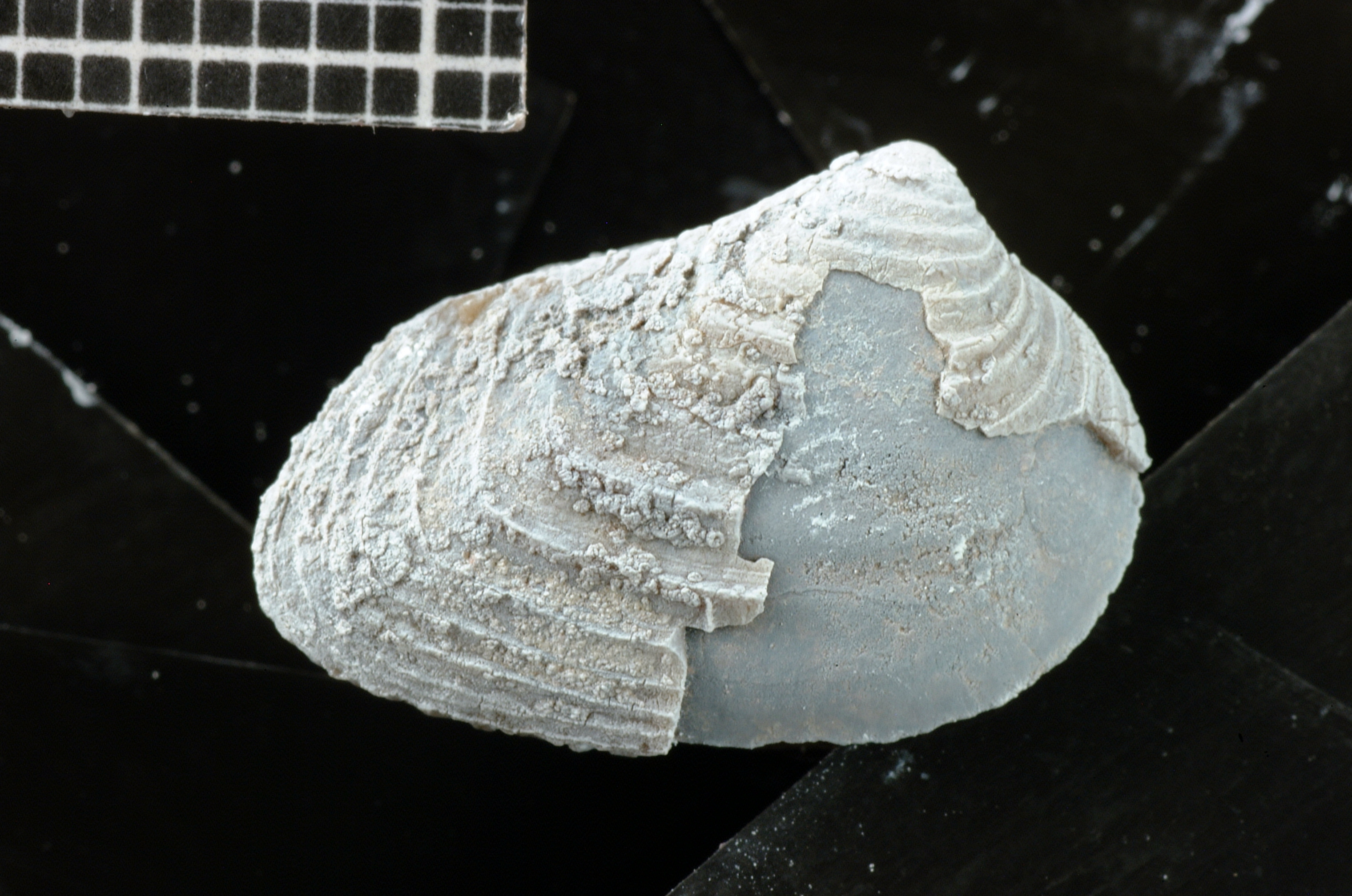 Disparilia elongata. Vista derecha.